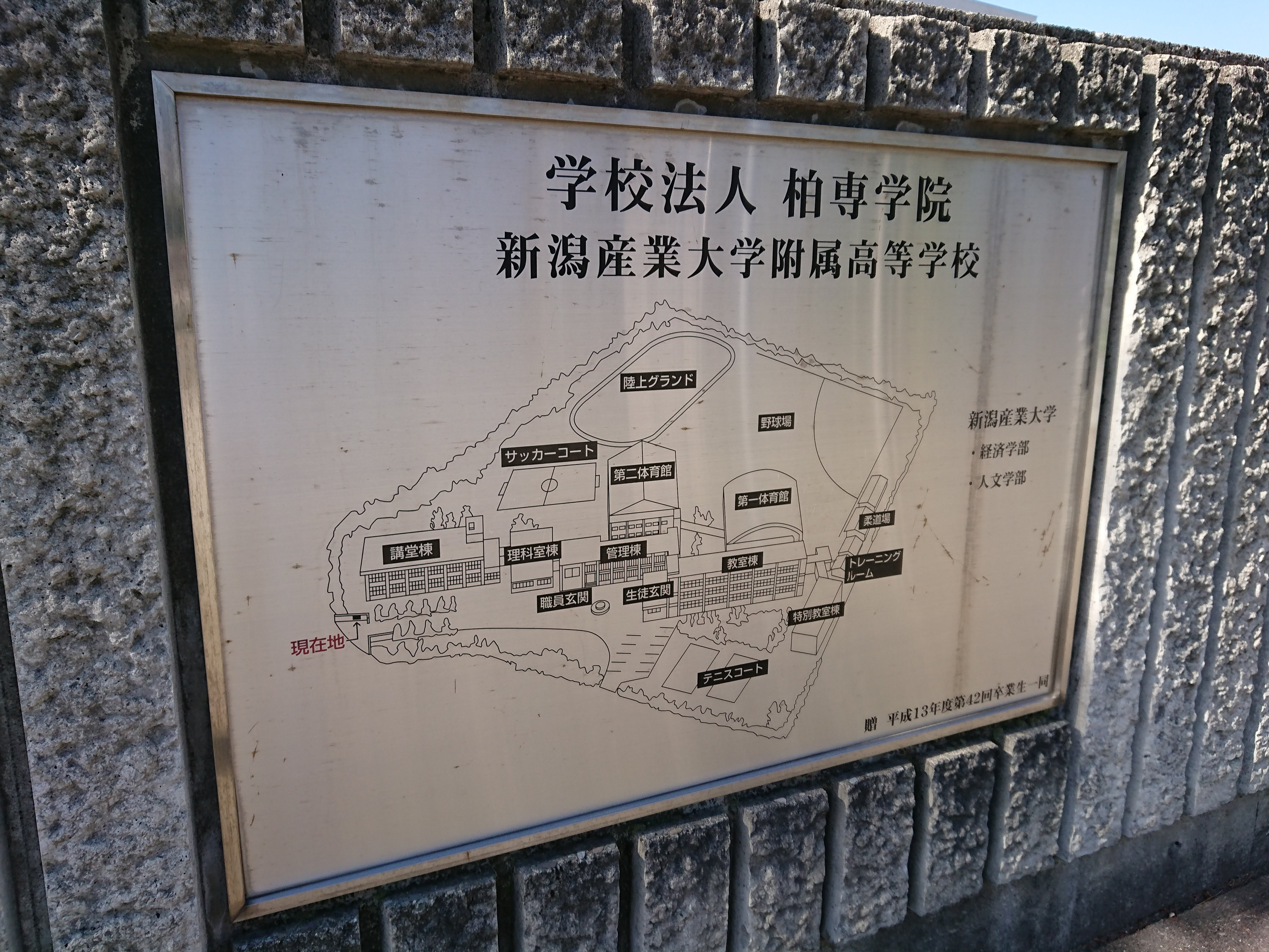 新潟産業大学附属高校に設置されている校舎見取り図（平成13年度 第42回卒業生の寄贈品）